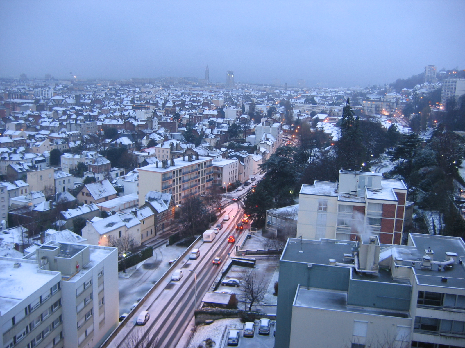 Le Havre (Seine-Maritime, Haute-Normandie, France) - La ville sous la neige.